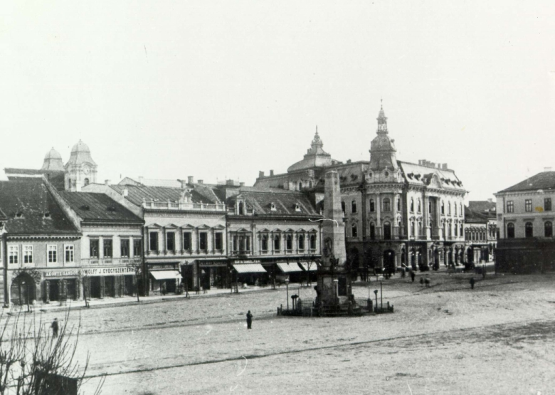 Kolozsvári Karolina oszlop 1907-ben